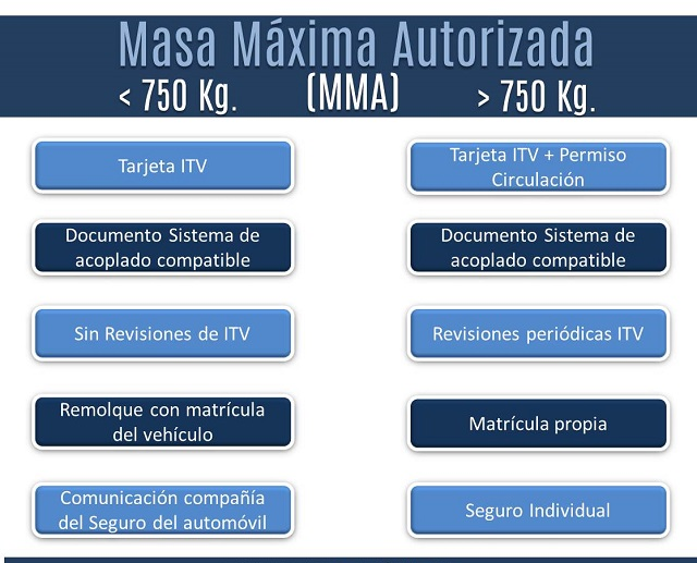 Requisitos Caravanas según su MMA en España